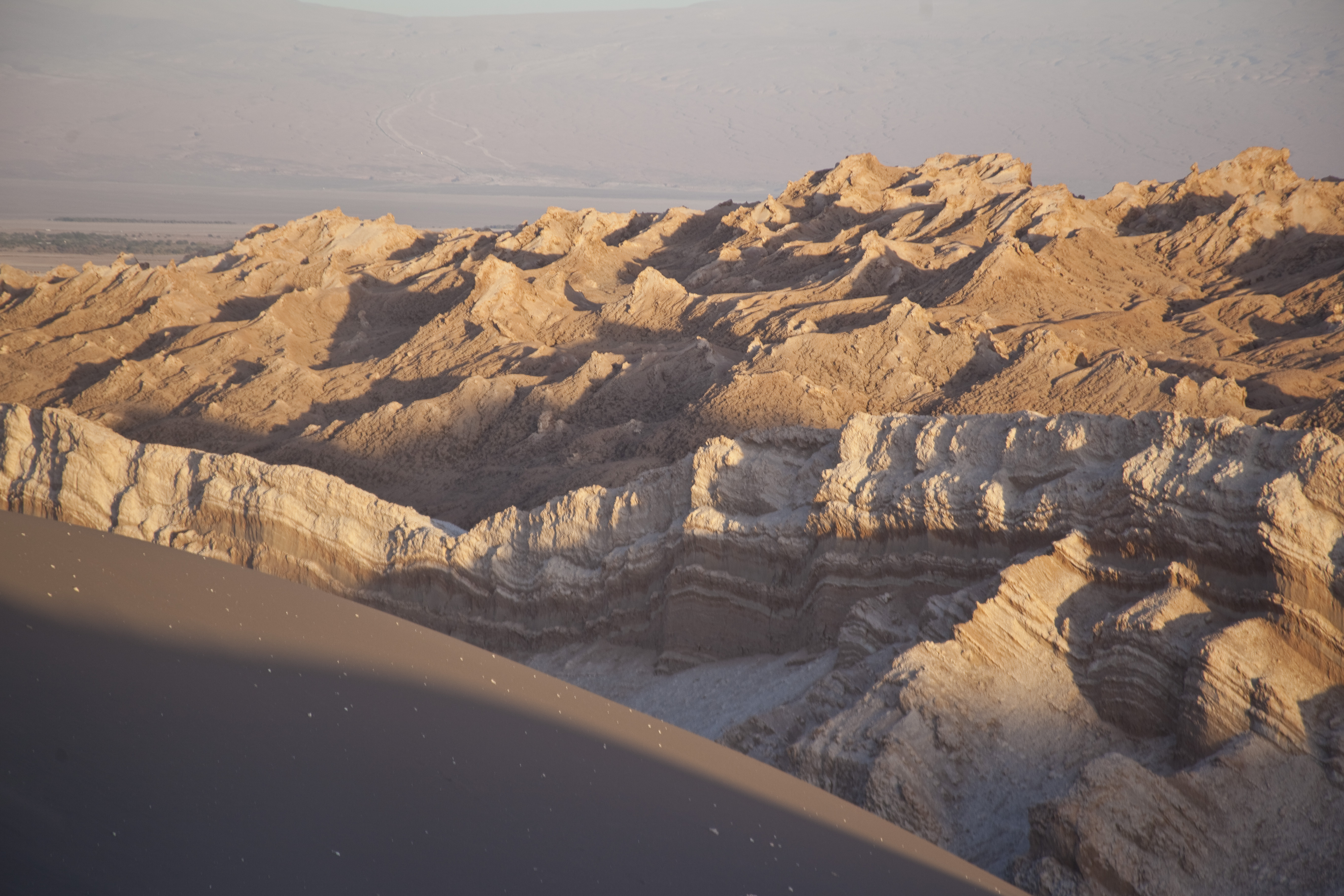 Valle de la Luna, estratificaziónLietuvių: Stratificazione nella valle della luna This is a photo of a national monument in Chile: 544